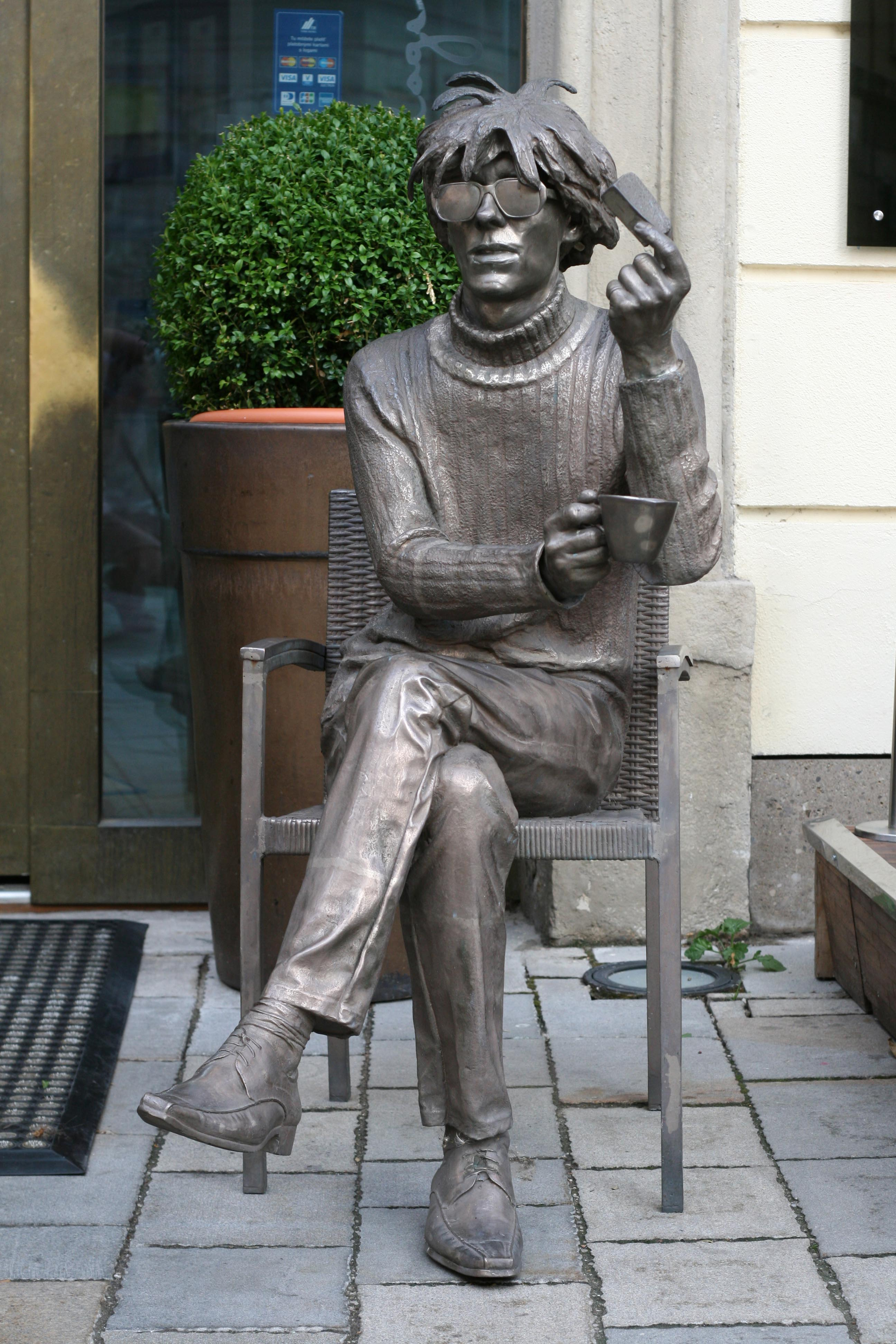 Bronzová plastika Andyho Warhola na bratislavskej Ventúrskej ulici